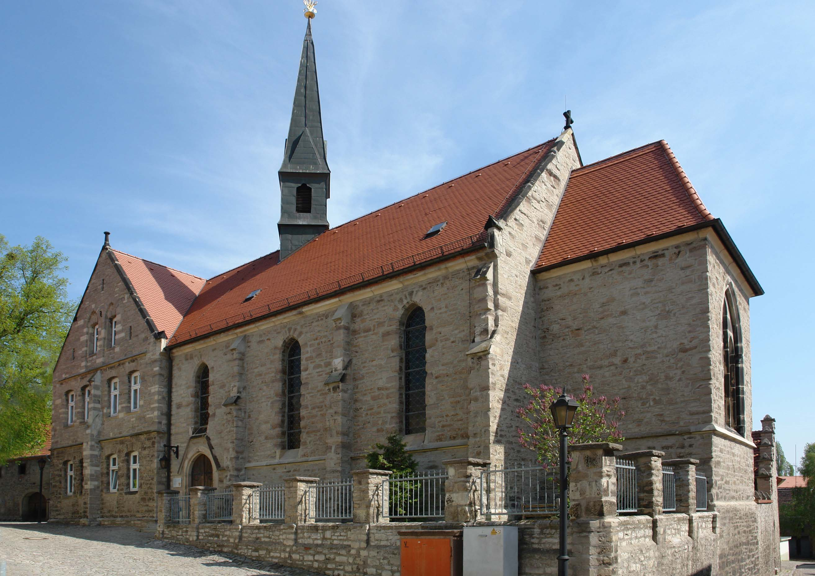 Katholische Kirche St. Elisabeth Alsleben (Saale) von der Grabenstraße aus gesehen